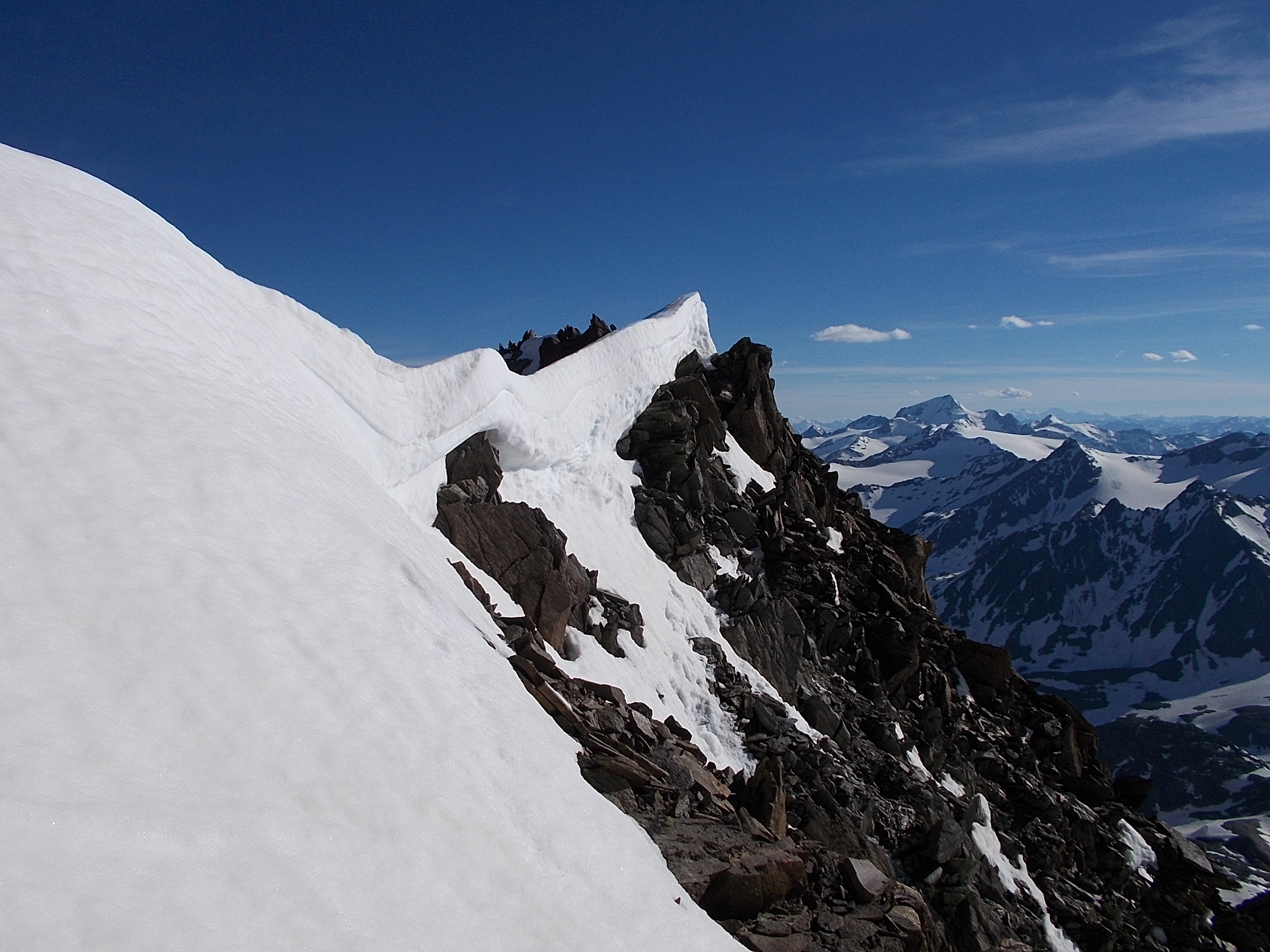 Der schmale Grat zwischen Vor- und Hauptgipfel des Vorderen Brochkogels